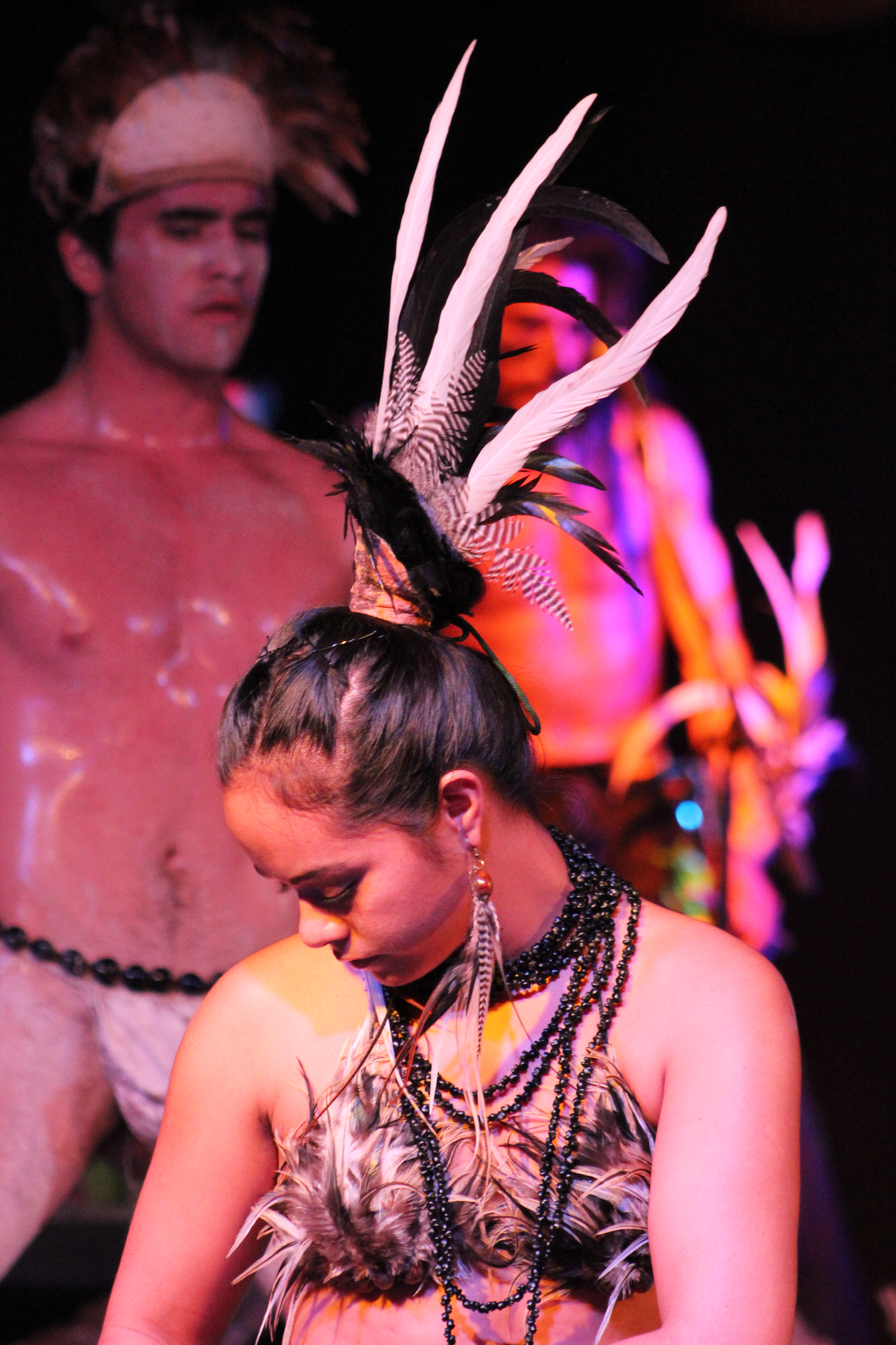 Imagen correspondiente a la danza tradicional de Rapa Nui - Isla de Pascua This is a photo of a national monument in Chile: 628